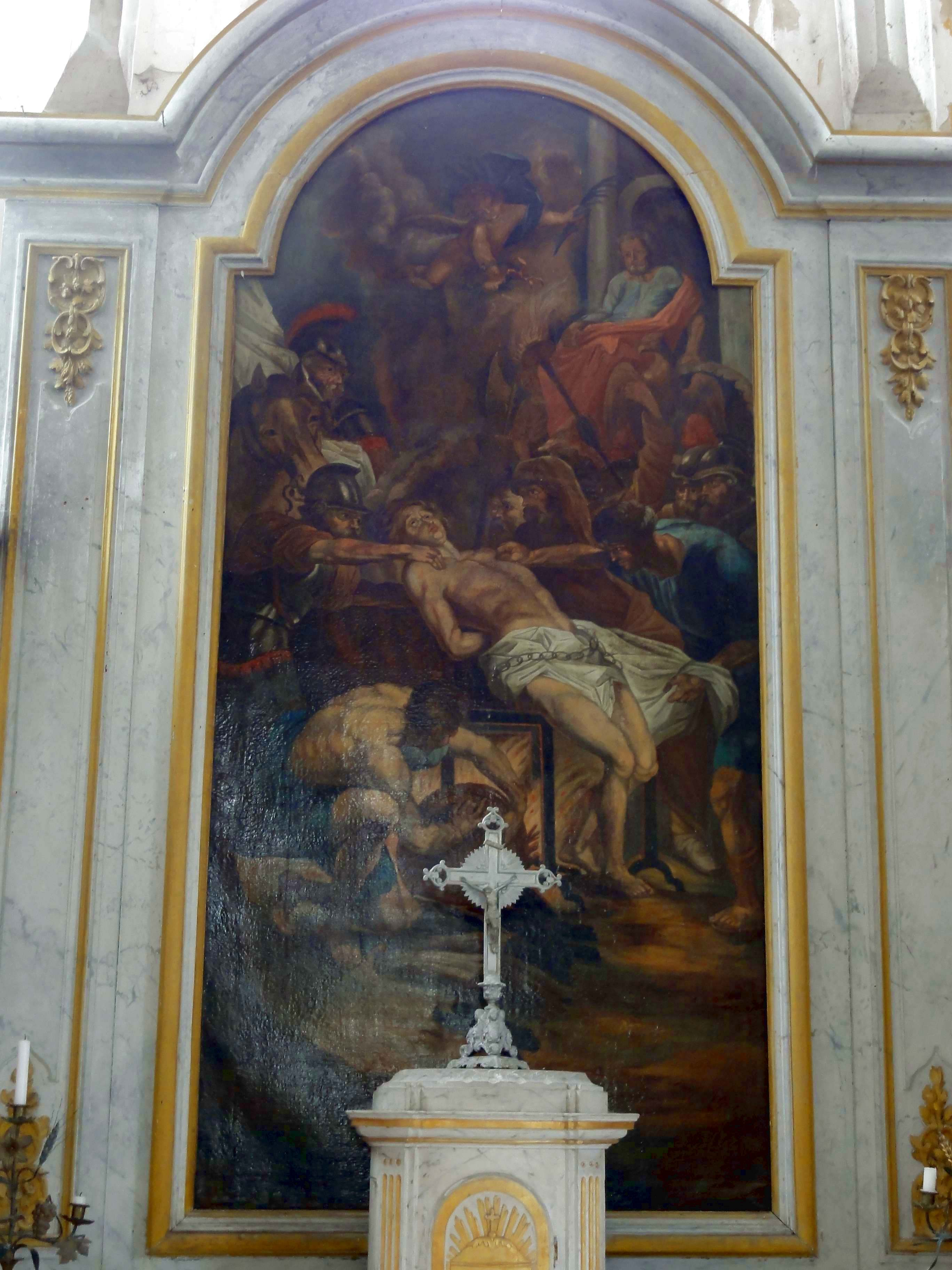 Retable du maître-autel, tableau - Le martyr de saint Laurent, copie d'après Peter Paul Rubens.